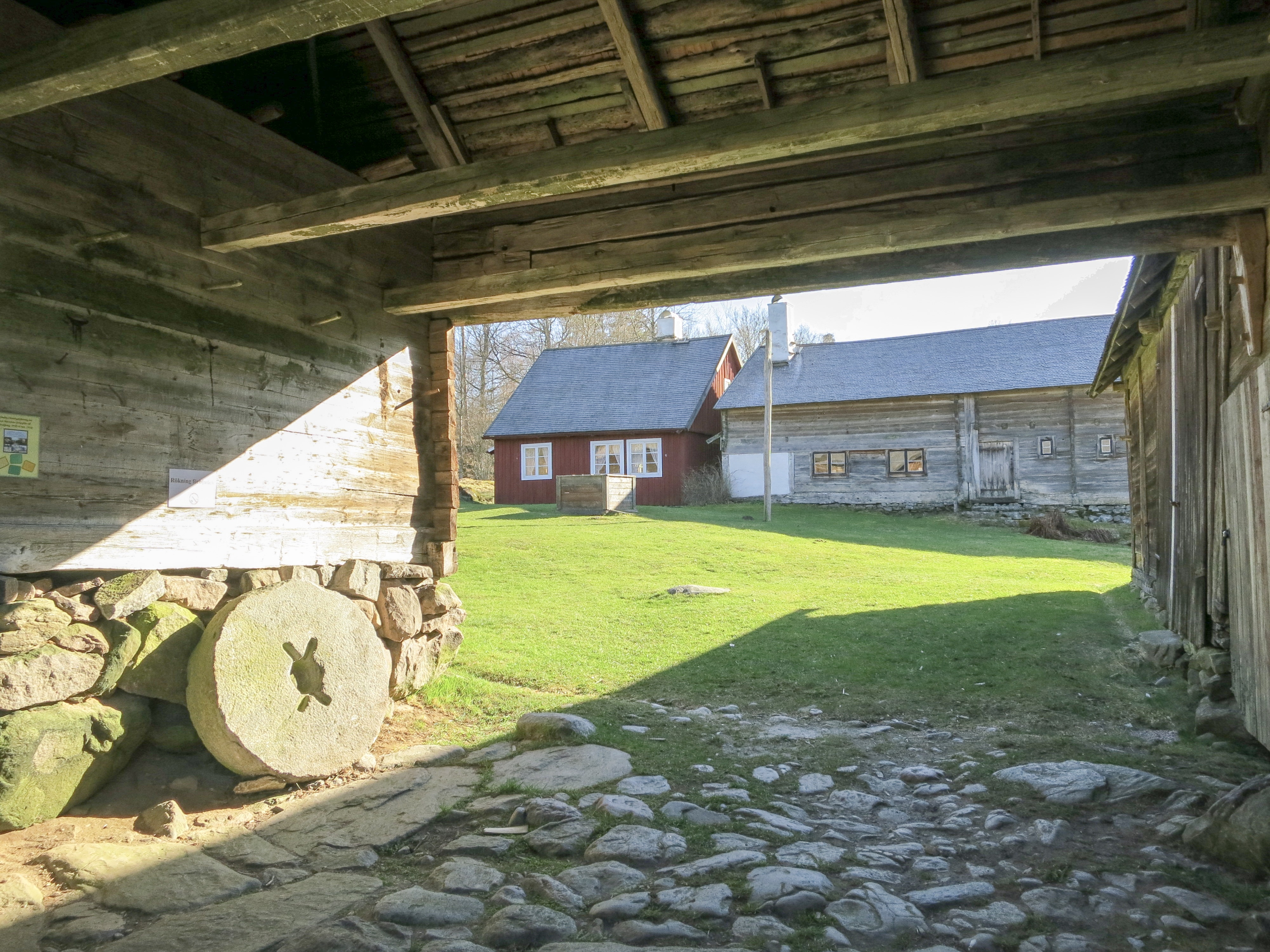 Sporrakulla gård